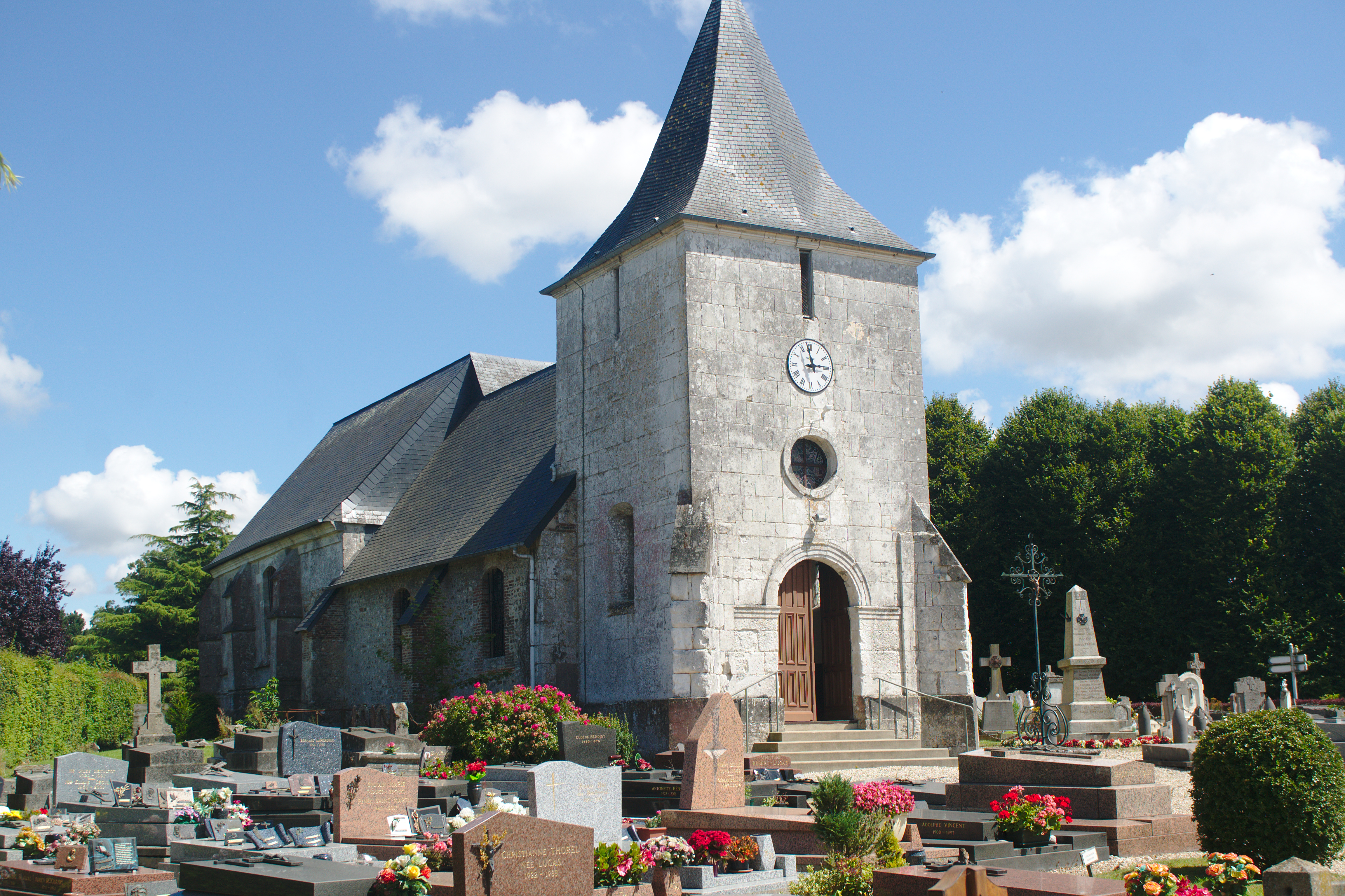 L'église de Gonfreville-Caillot,Seine-Maritime,Haute-Normandie,France.